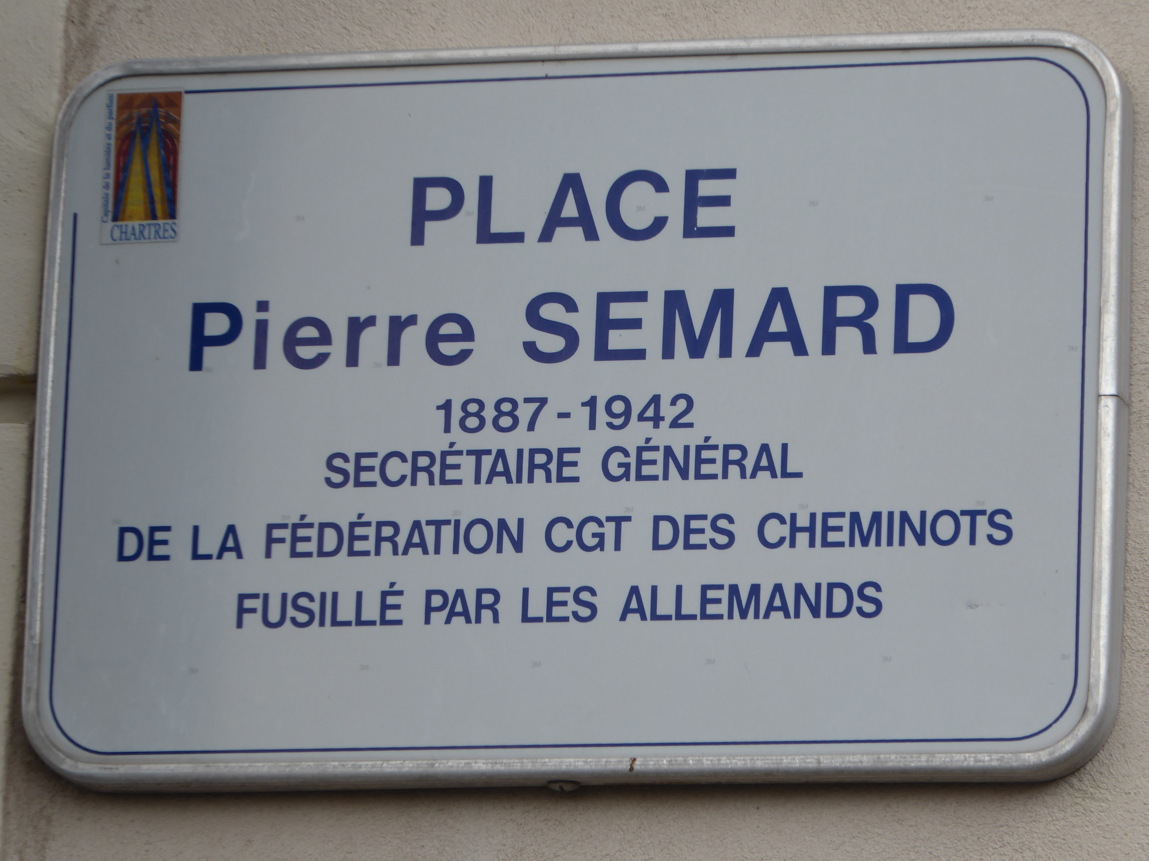 Plaque "Place Pierre Semard", Chartres, Eure-et-Loir (France)